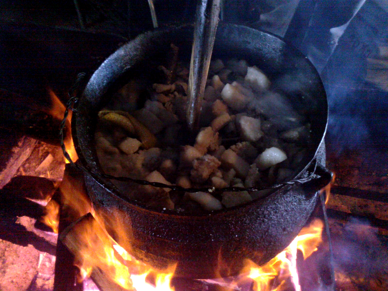 Preparación de chicharrones y obtención de manteca de chancho en un reitimiento en Quinched, Isla de Chiloé, Chiloé.